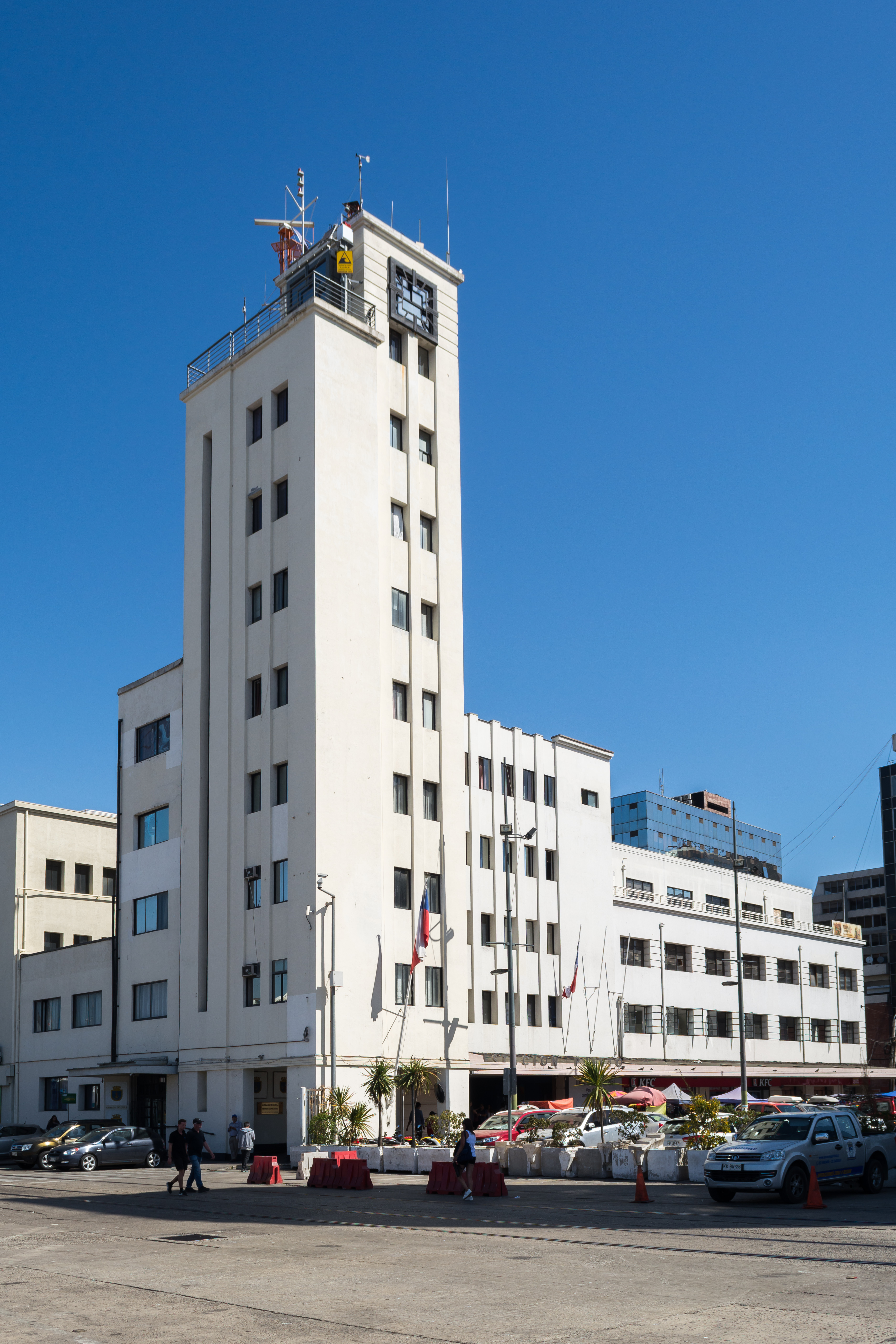 Estación Puerto, Valparaíso, Región de Valparaíso, Chile